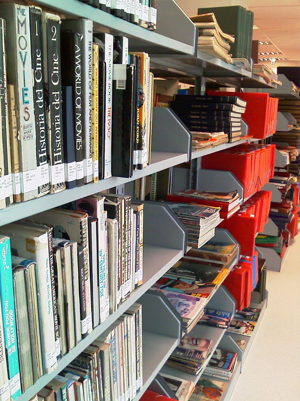 Foto retirada da coleção de Henrique Padjem, localizada na Biblioteca Central Irmão José Otão da PUCRS.